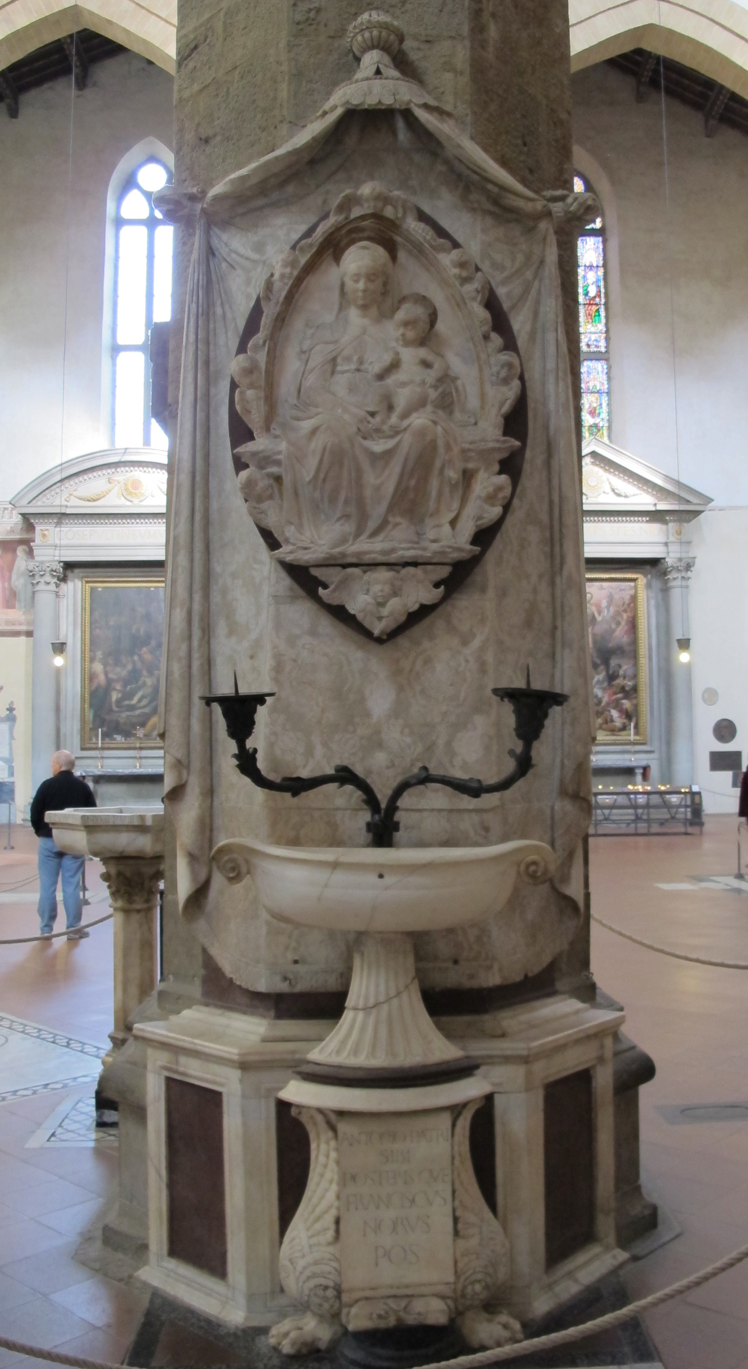 Tomba di Francesco Nori, Madonna del Latte di Antonio Rossellino (1478) 1